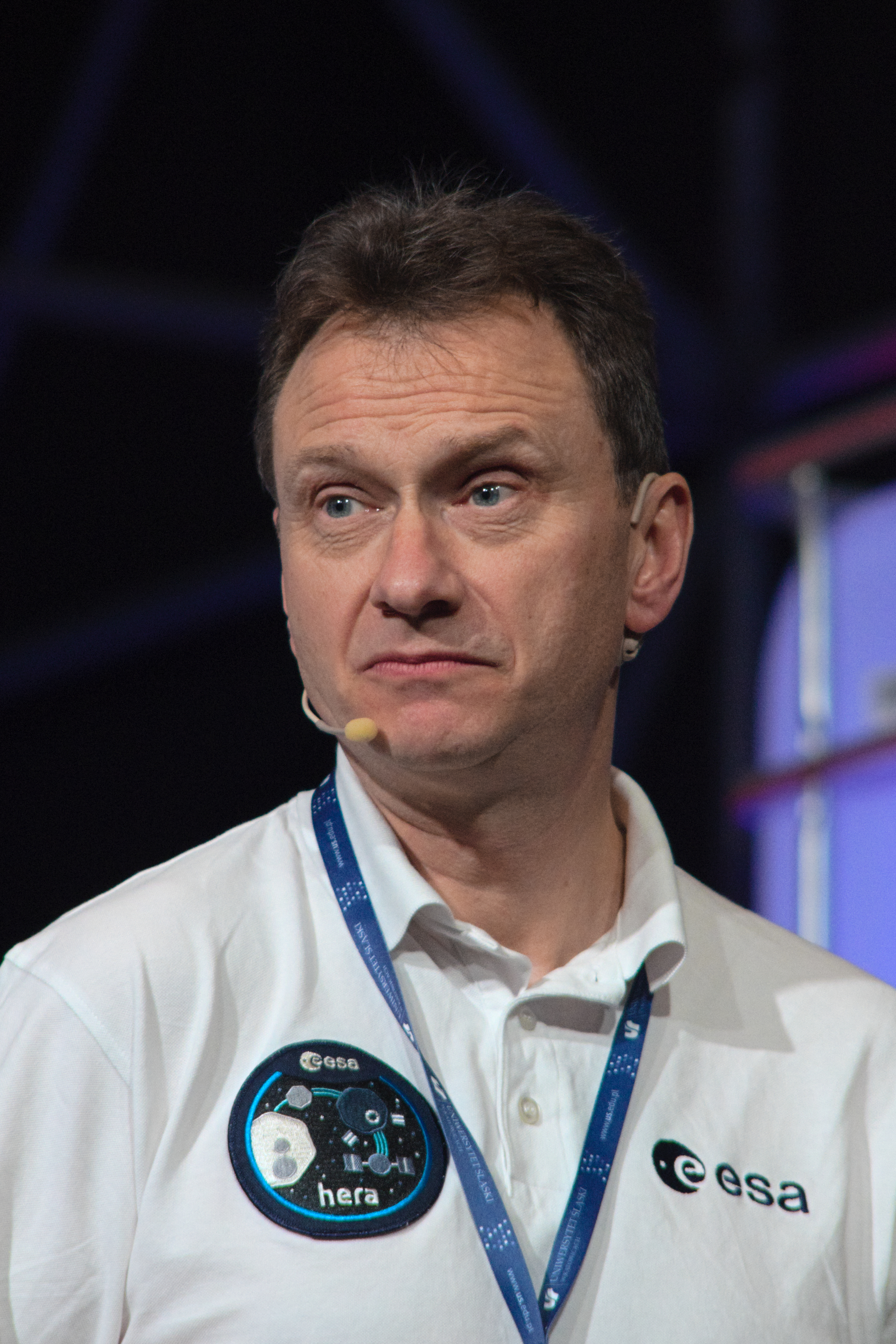 Alan Fitzsimmons, brytyjski astronom podczas swojego wykładu o asteroidach pt. „Defending our Planet from Asteroids” na scenie głównej 4. Śląskiego Festiwalu Nauki w Międzynarodowym Centrum Kongresowym w Katowicach